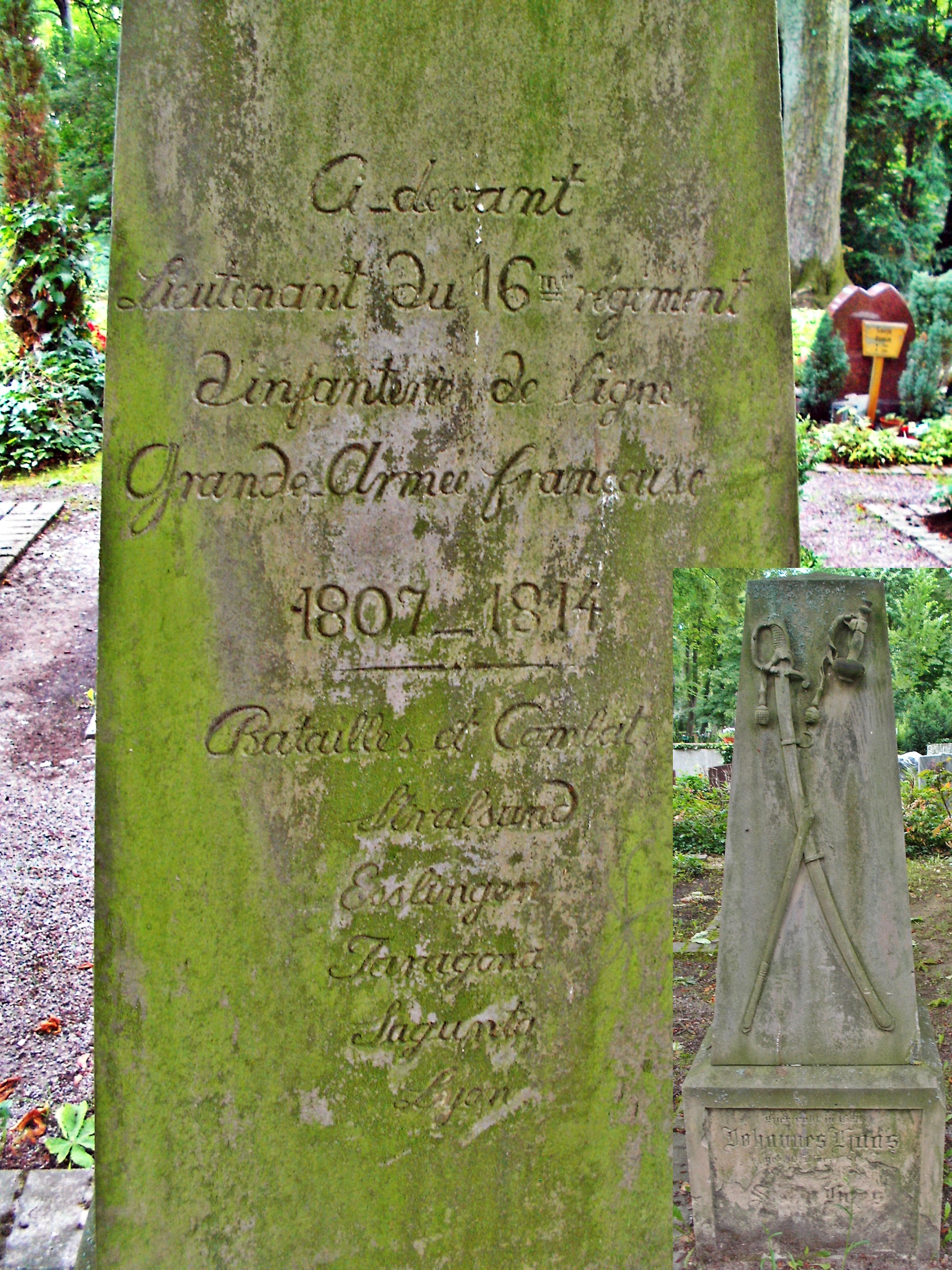 Frankenthal (Pfalz), Hauptfriedhof, Grabstein des Napoleonveteranen Johannes Haas mit Auflistung der mitgemachten Gefechte und seines Truppenteils auf der Rückseite des Steins.